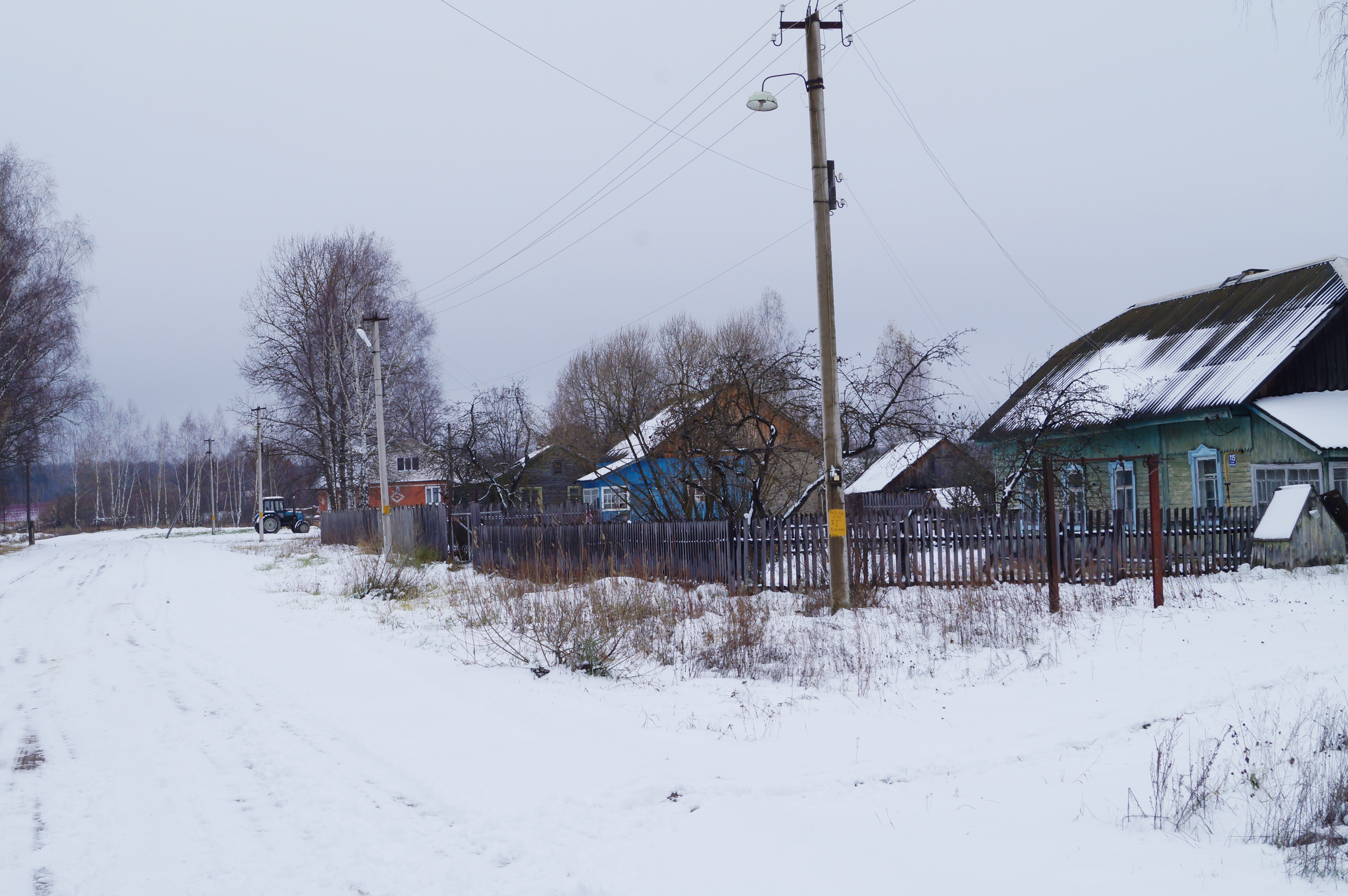 Деревня Дубровка (Думиничский р-н)